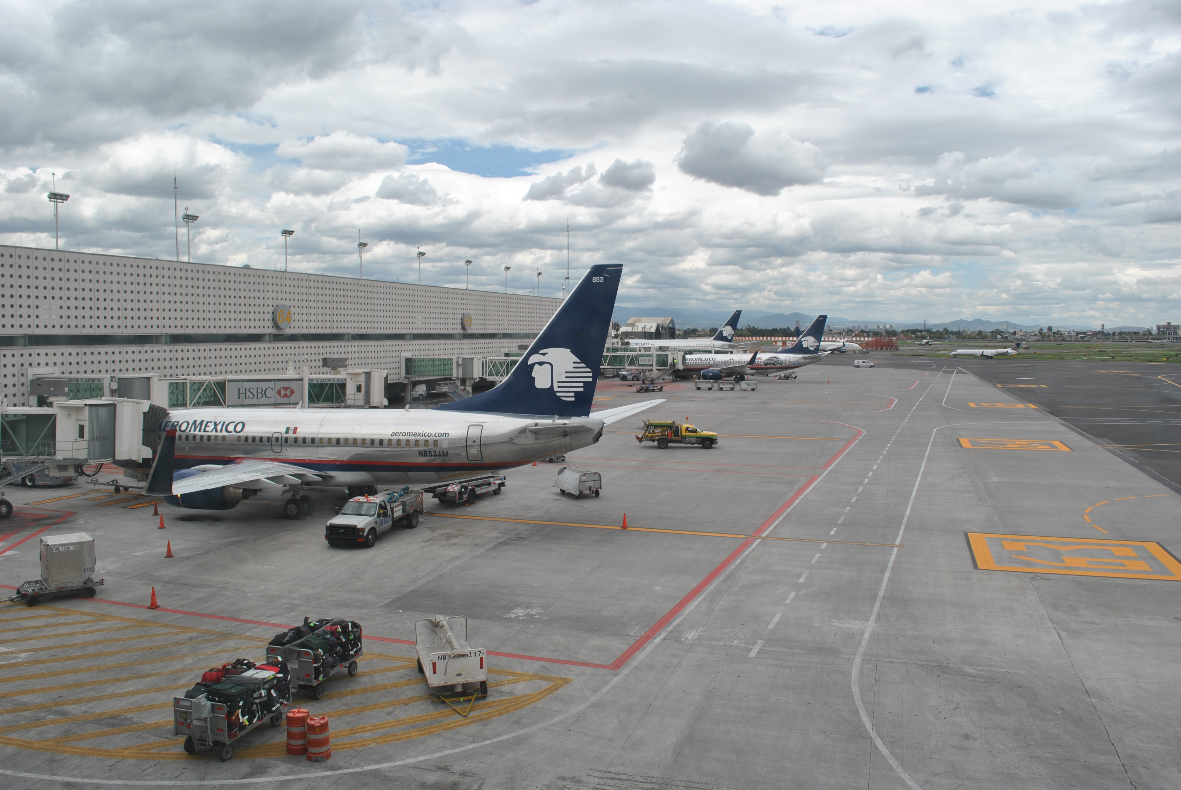 Hangar AICM Terminal 2